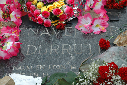 ZRZ Tumba de Durruti Ediciones Refractarias Edición 7 ejemplares numerados y firmados. Existen cuatro ejemplares a la venta. Precio 90€ c/u